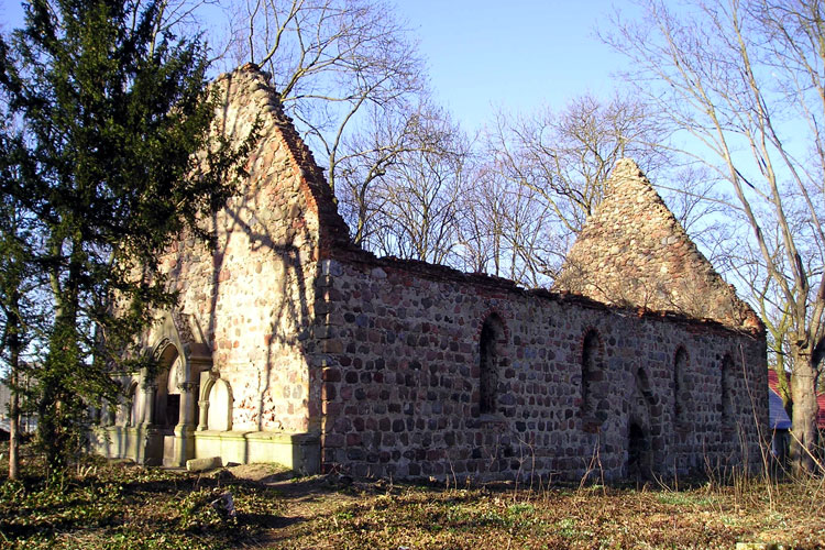 Pargowo - ruina kościoła, pocz. XIV